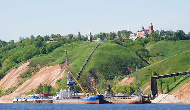 Вшиха тавы күренеше